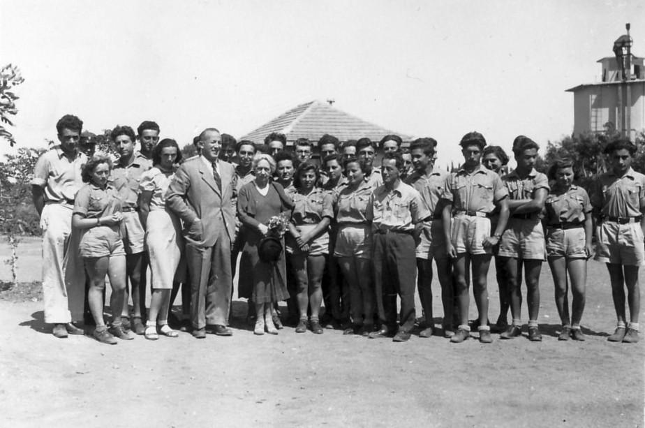 נוער ג' בביקור של הנרייטה סאלד והנס בייט-מראשי עליית הנוער, בגן-שמואל.